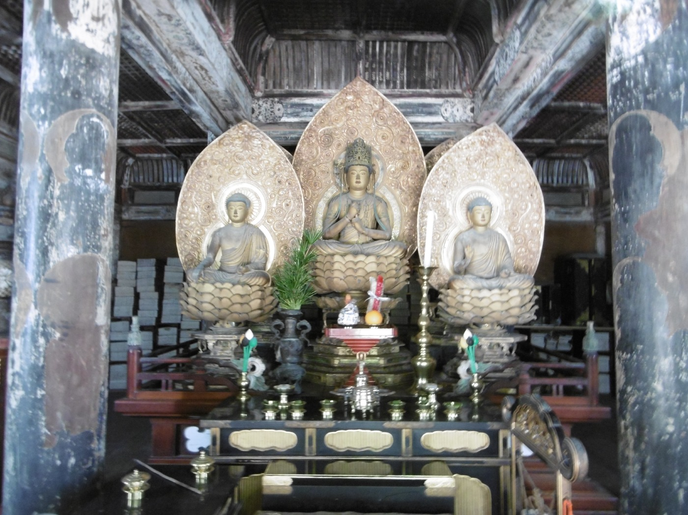 金剛三昧院 多宝塔の内部